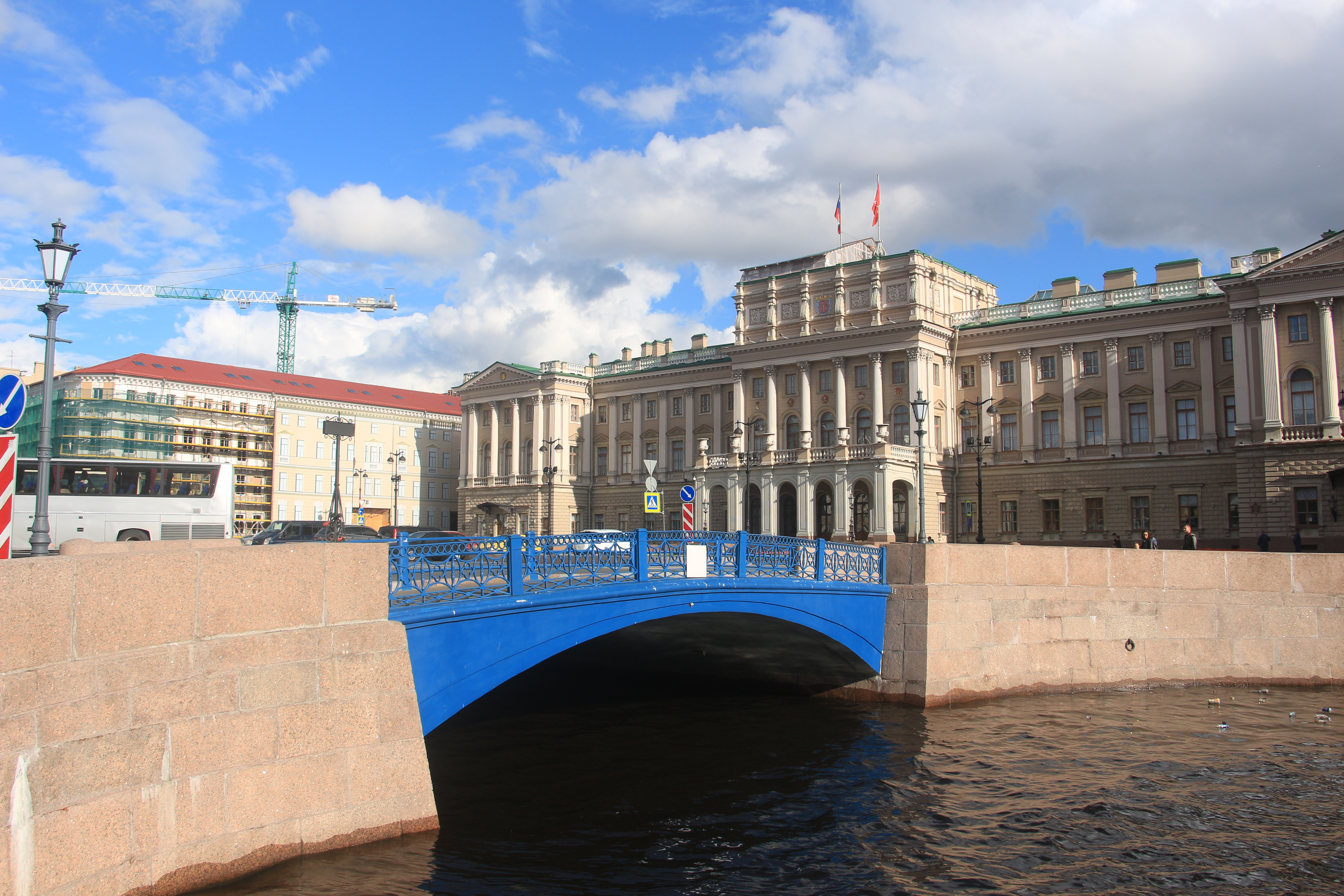 Синий мост: через р. Мойку, по Исаакиевской площади, Адмиралтейский район, Санкт-Петербург